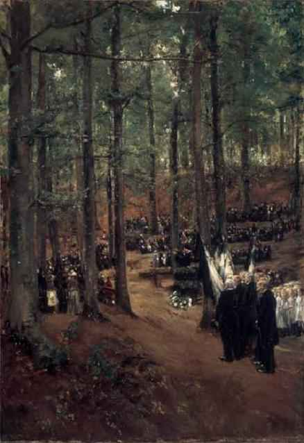 Max Liebermann stellte sich in der Buchenhalle von Bad Kösen 1888 einen Trauergottesdienst für den soeben verstorbenen Kaiser Friedrich III. vor.